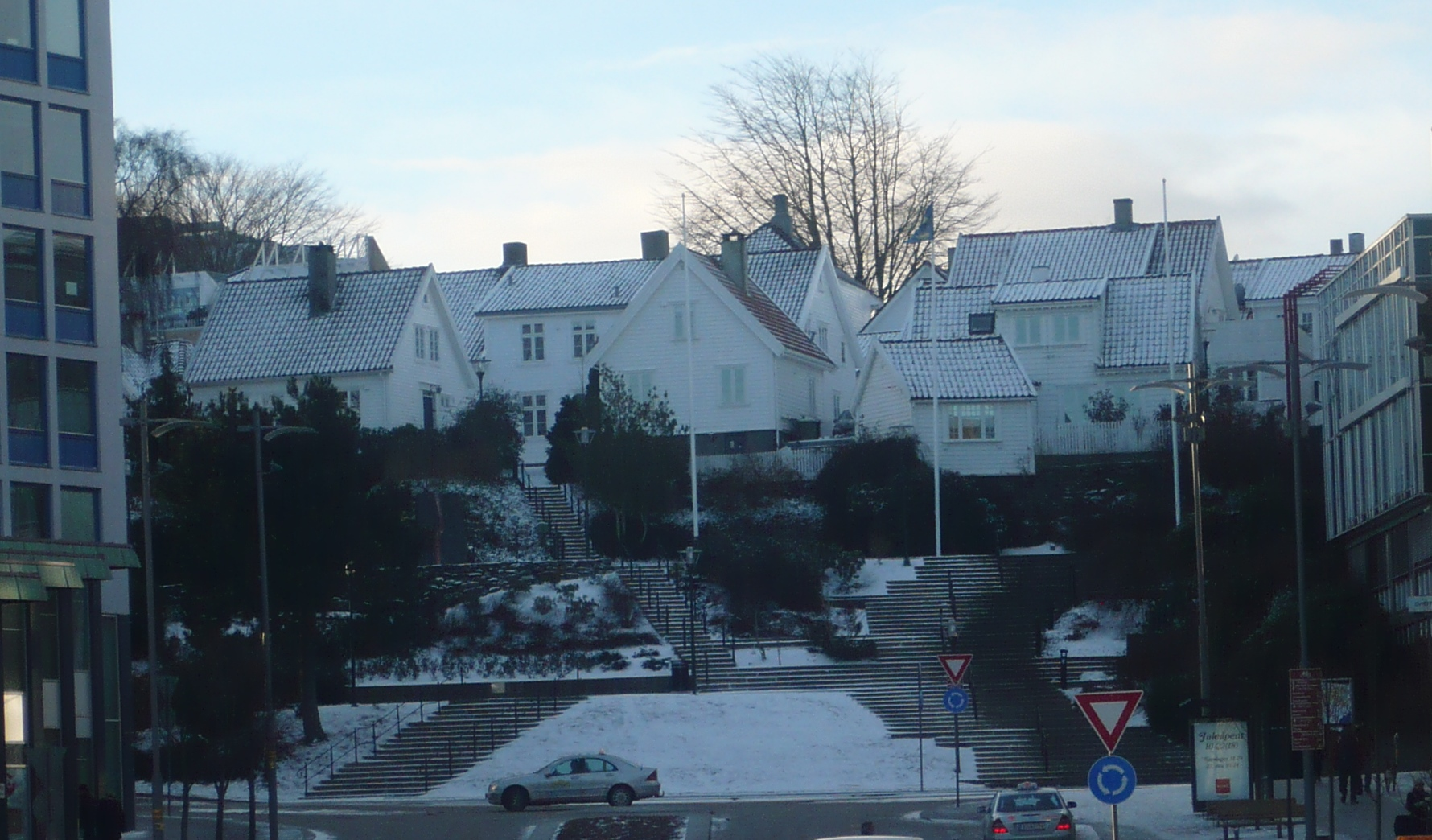 Utsyn fra Torget mot Olavskleivå i Stavenger.